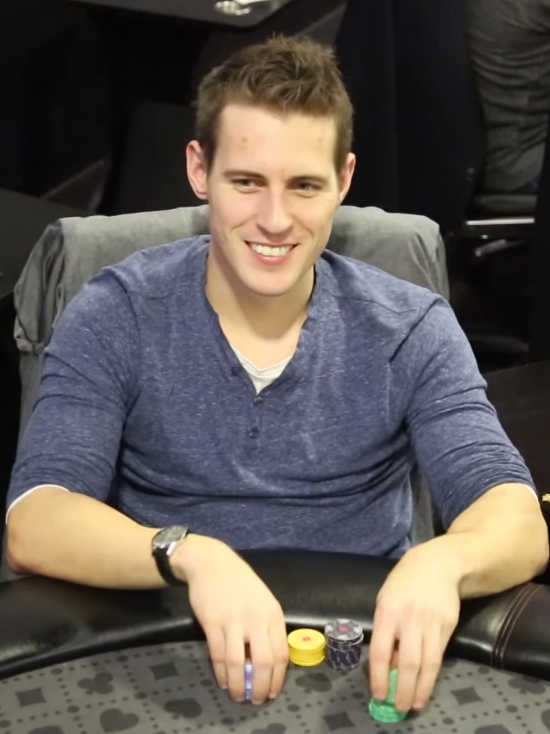 Mike McDonald bei der partypoker WPT Montreal